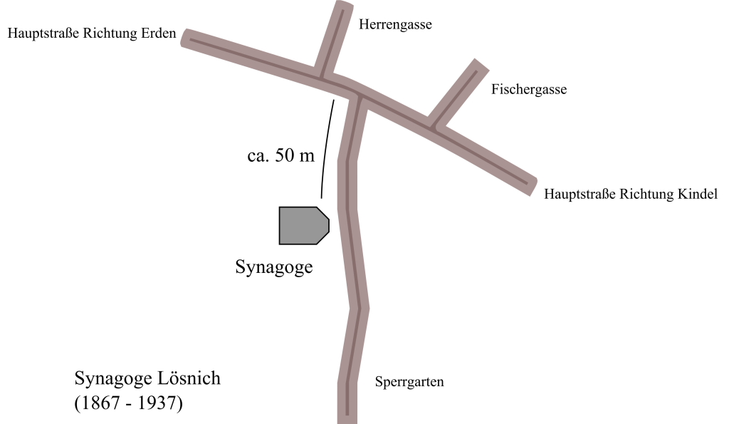 Skizzierter Lageplan der ehemaligen nicht mehr vorhanden Synagoge von Lösnich.